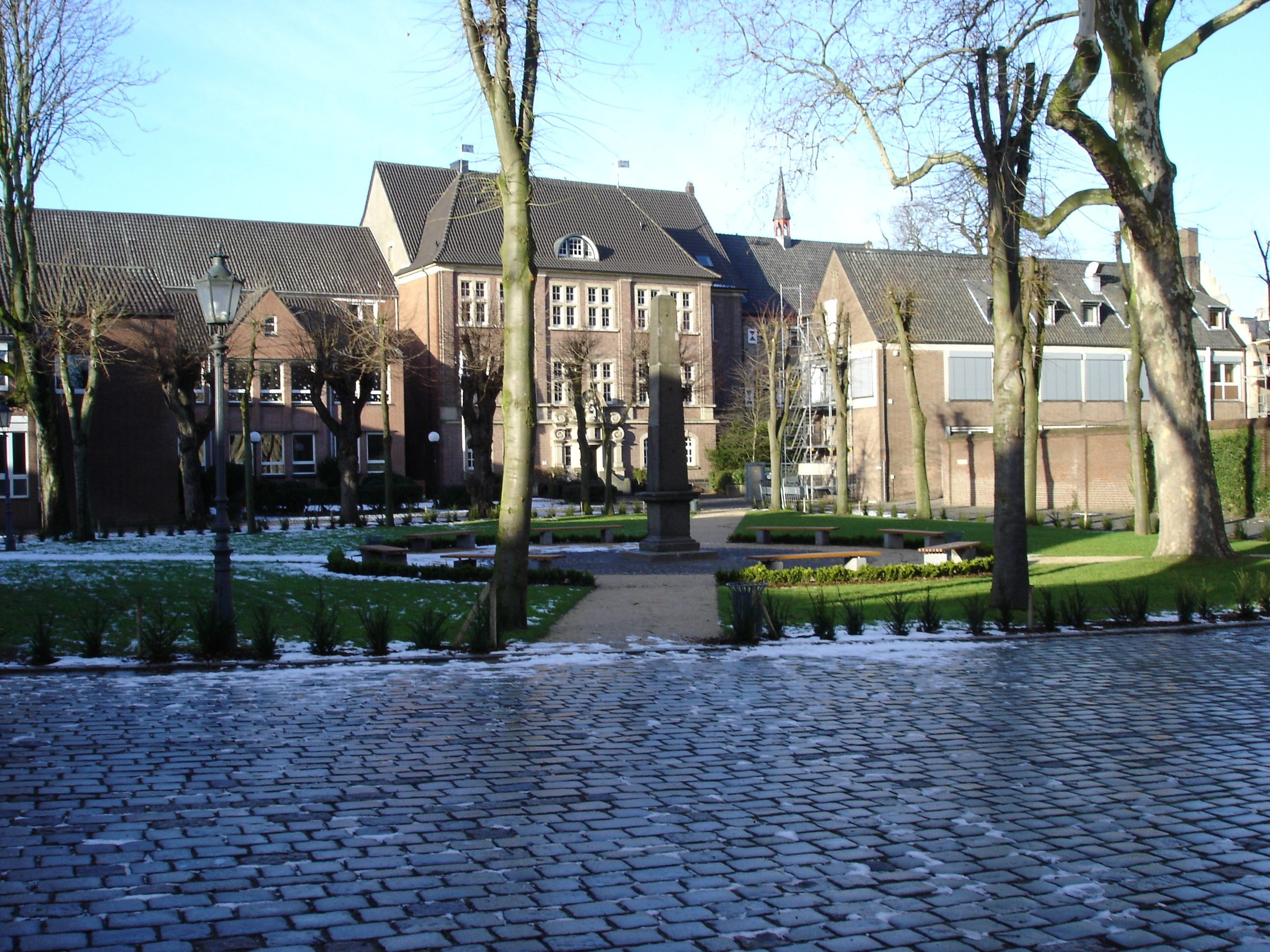 Obelisk de Pauw im „Kapitel“, Xanten This is a photograph of an architectural monument.